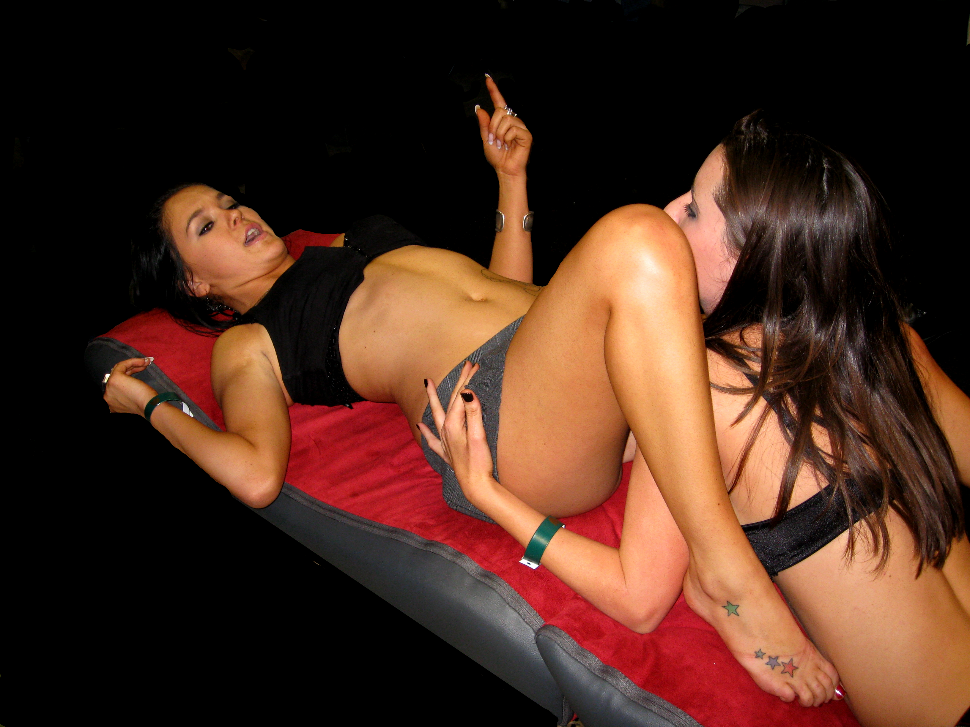 AEE2008_Day1 039